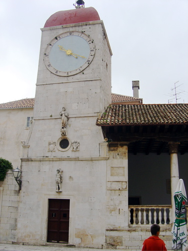 Detalj iz Trogira. Ova slika je stavljena u slobodni opticaj od strane autora slike: Karlo Å iljeg. Uporaba je dozvoljena i za druge svrhe, ali je potrebno spomenuti ime autora.